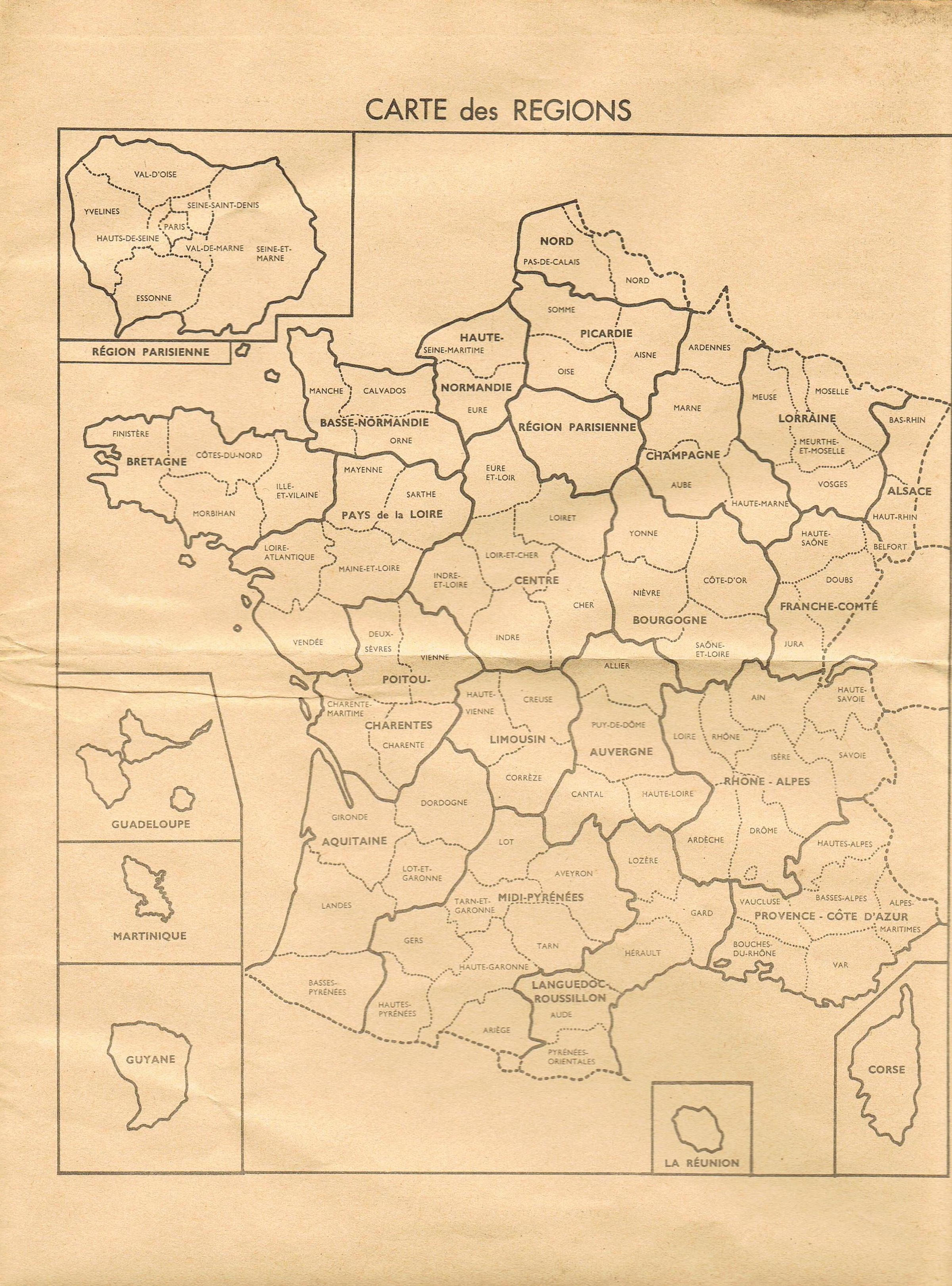 Régions telles qu'elles étaient prévues par la réforme sur la régionalisation, rejetée par référendum le 27 avril 1969.